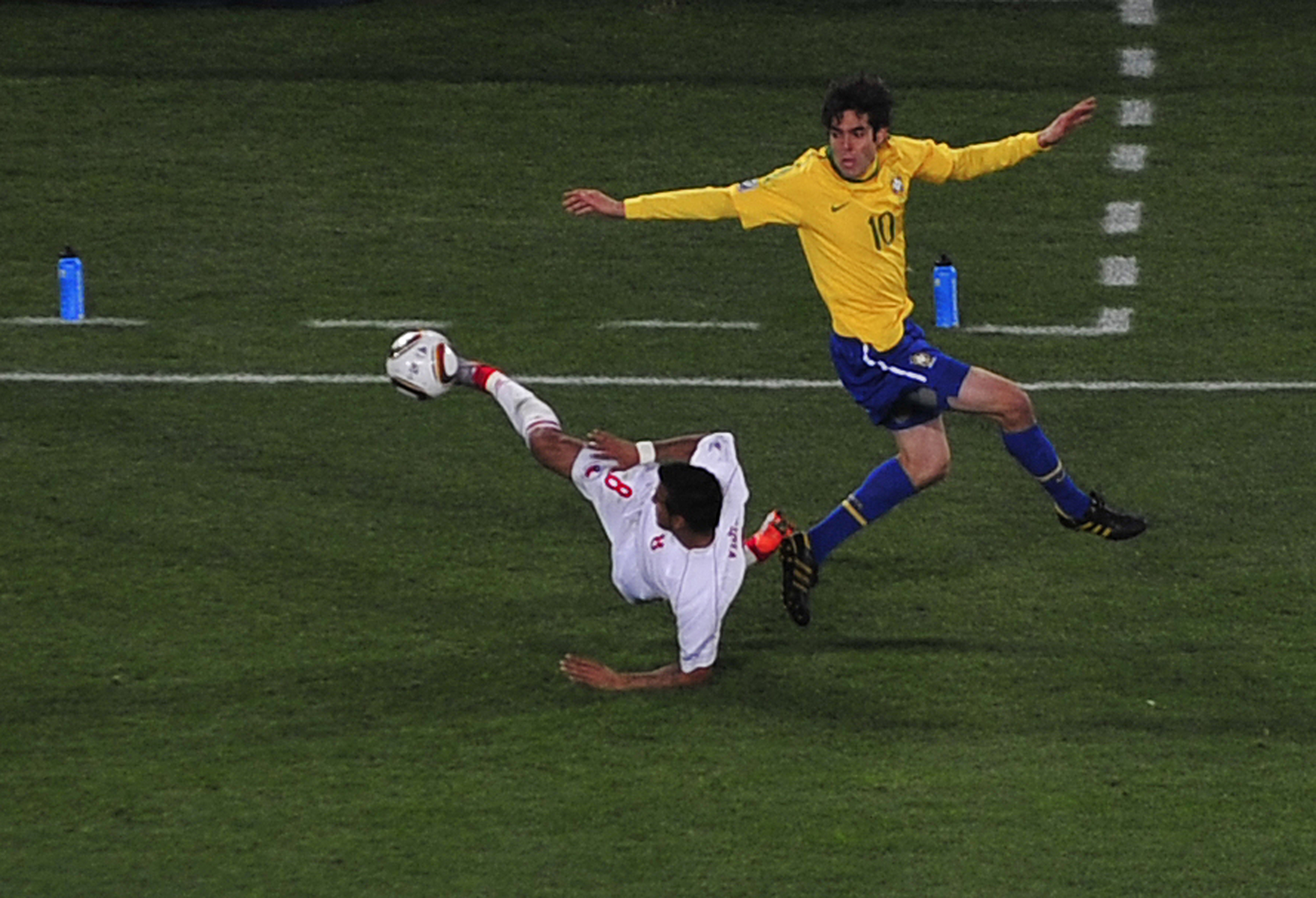 Joanesburgo - Kaká, um dos destaques da seleção brasileira na vitória sobre o Chile.